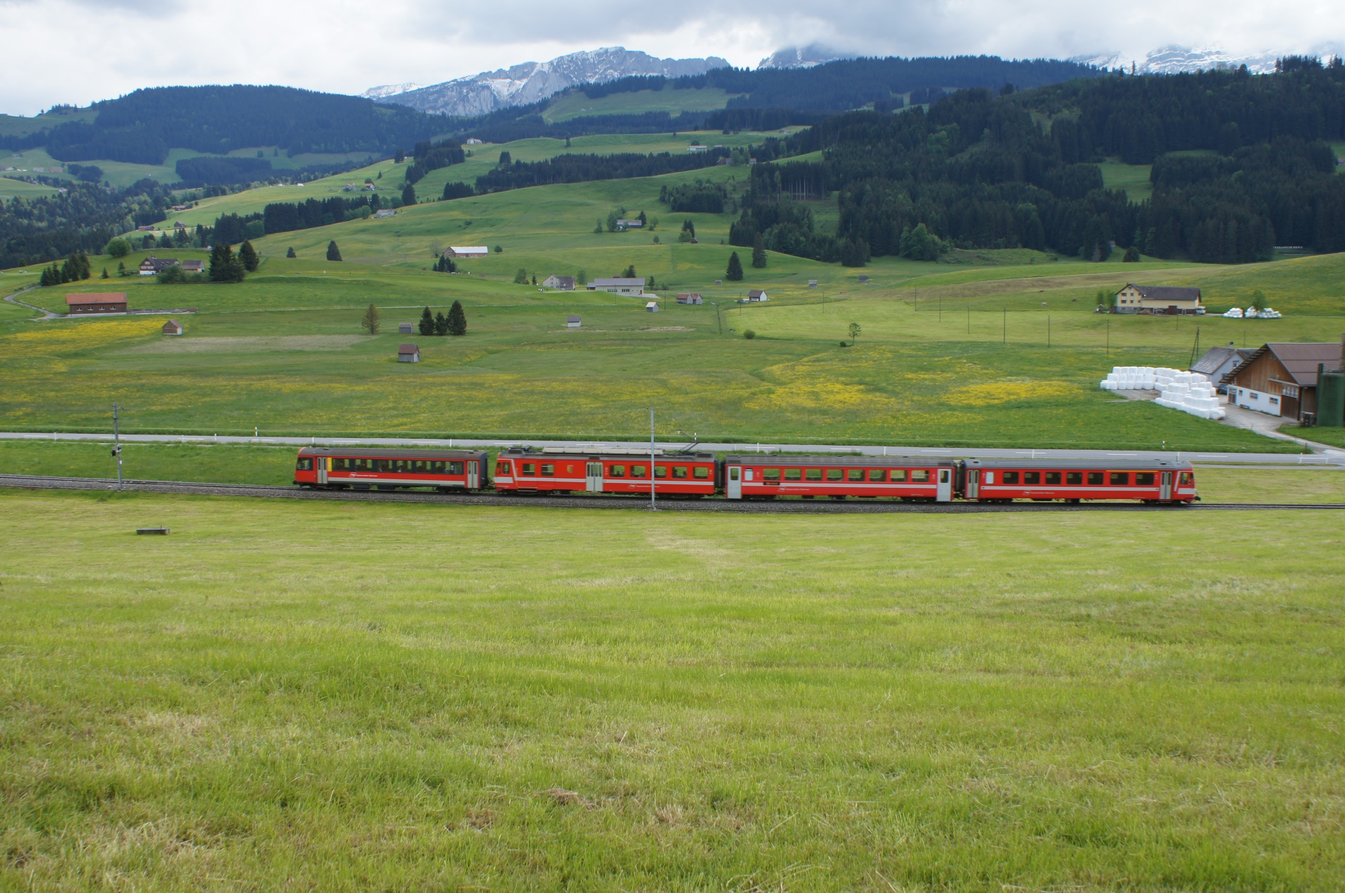 Triebwagen BDe 4/4 43 der Appenzeller Bahnen mit Steuerwagen ABt 114 und 143 sowie Zwischenwagen B 248 vor Gonten